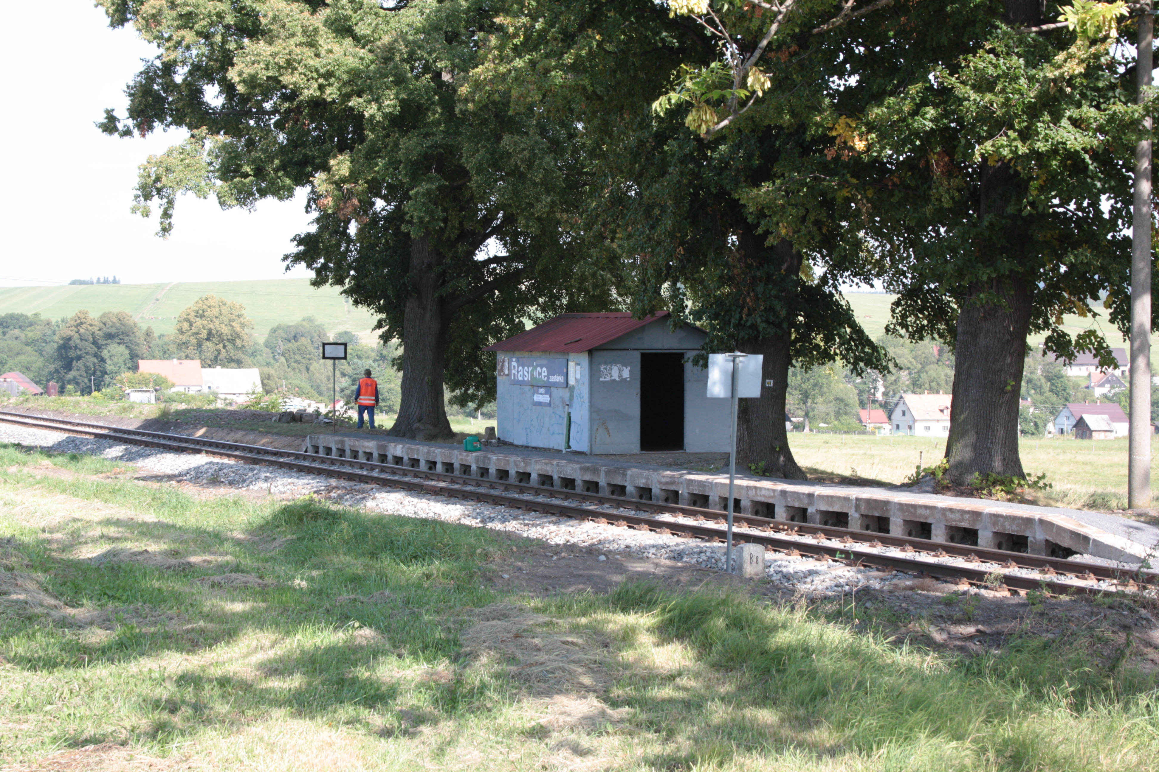 This photograph was taken with a DSLR from WMCZ's Camera grant. Železniční zastávka Řasnice zastávka v obci Dolní Řasnice v okrese Liberec.